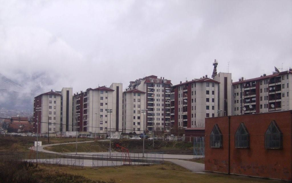 Srpski (latinica): Zgrade